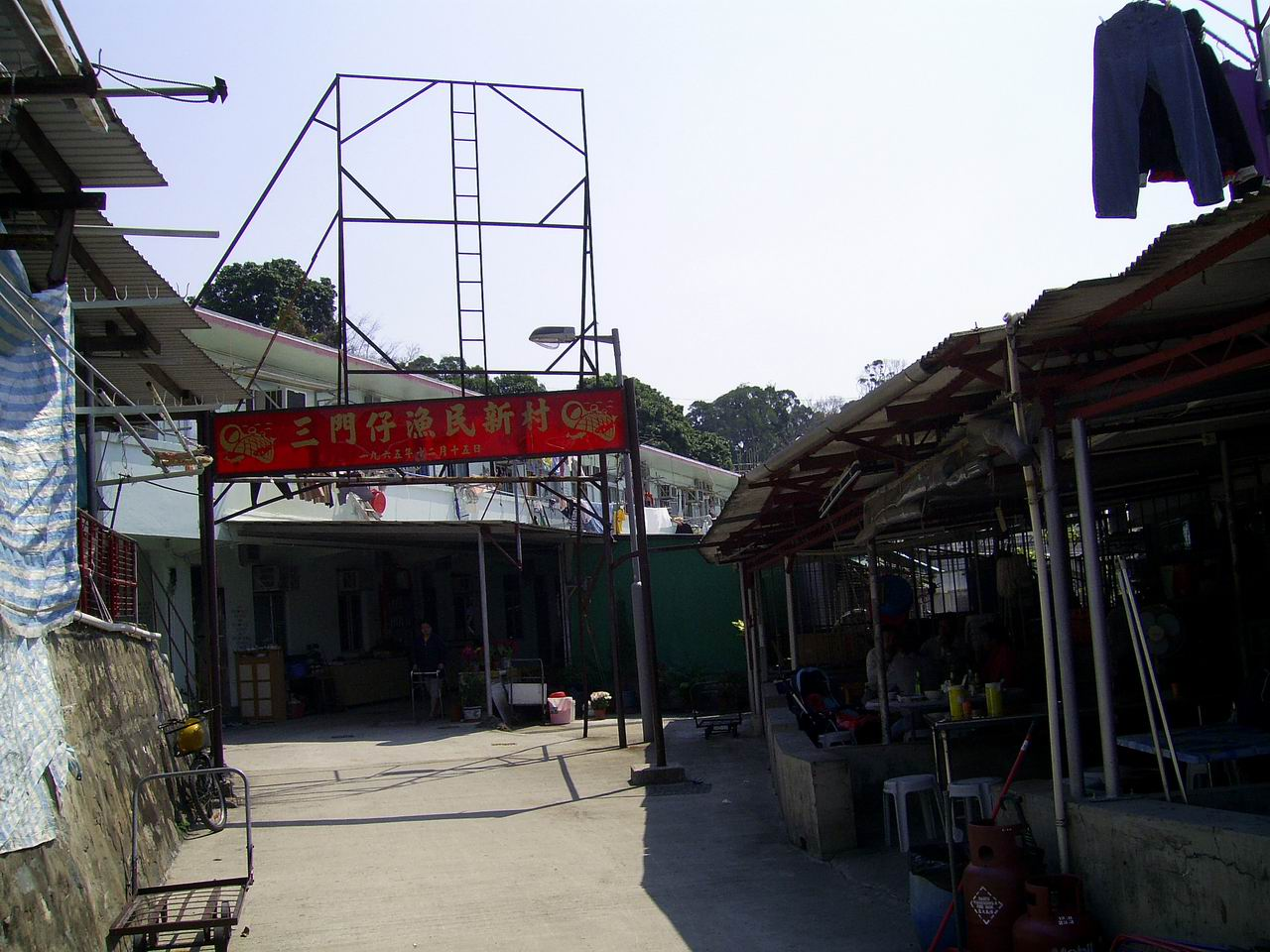 三門仔新村